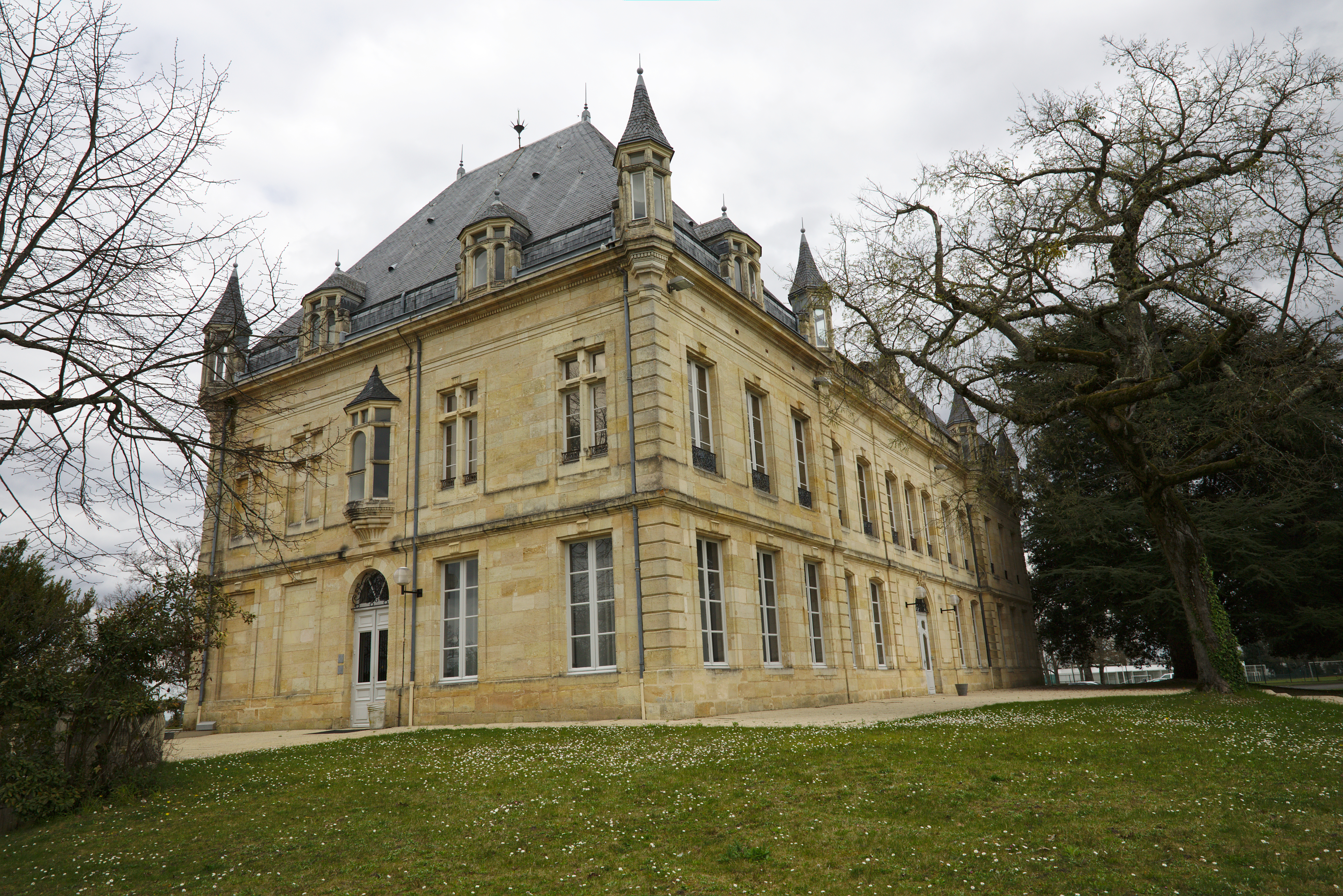 Château Bel-Air du Haillan